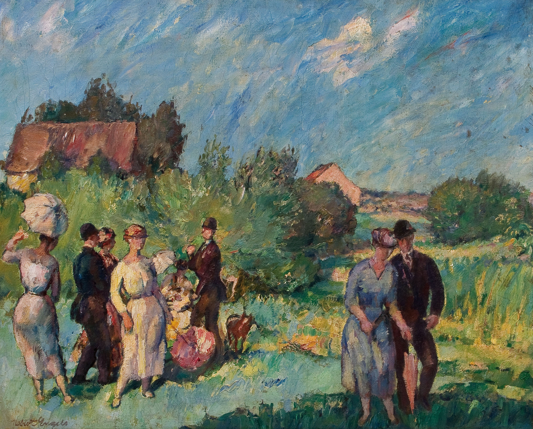 Festliche Gesellschaft im Grünen. Öl auf Leinwand. Unten links signiert Robert Engels. 68 x 80 cm